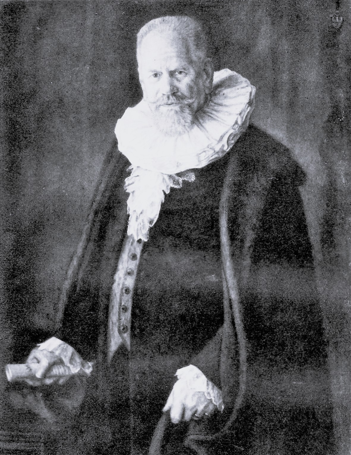 Emil Ferdinand Fehling (* 3. August 1847; † 3. August 1927), Bürgermeister der Freien und Hansestadt Lübeck